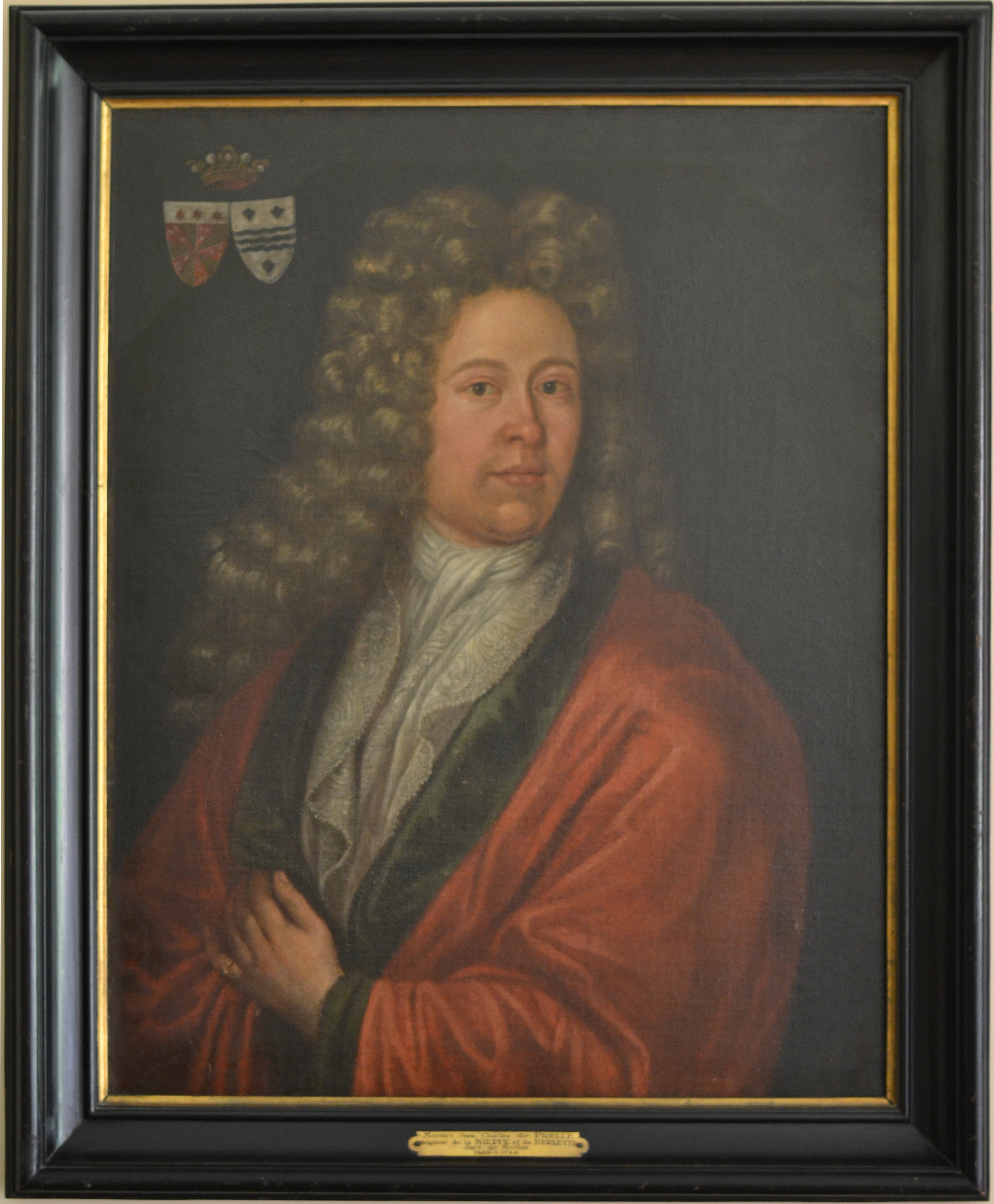 Portrait de Jean-Charles de Prelle (1669-1740)